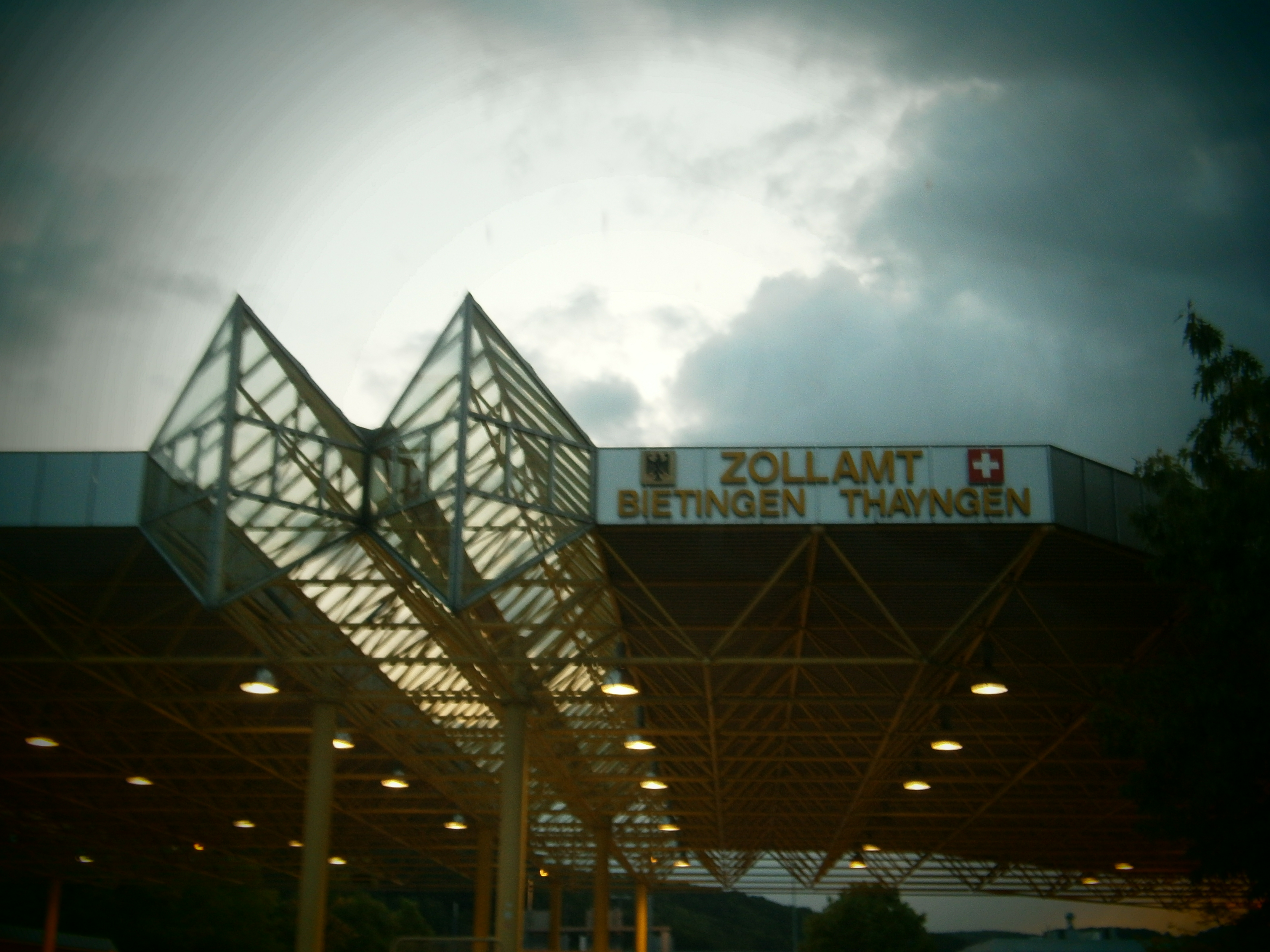 Das Zollamt in Bietingen und Thayngen an der deutsch-schweizerischen Grenze